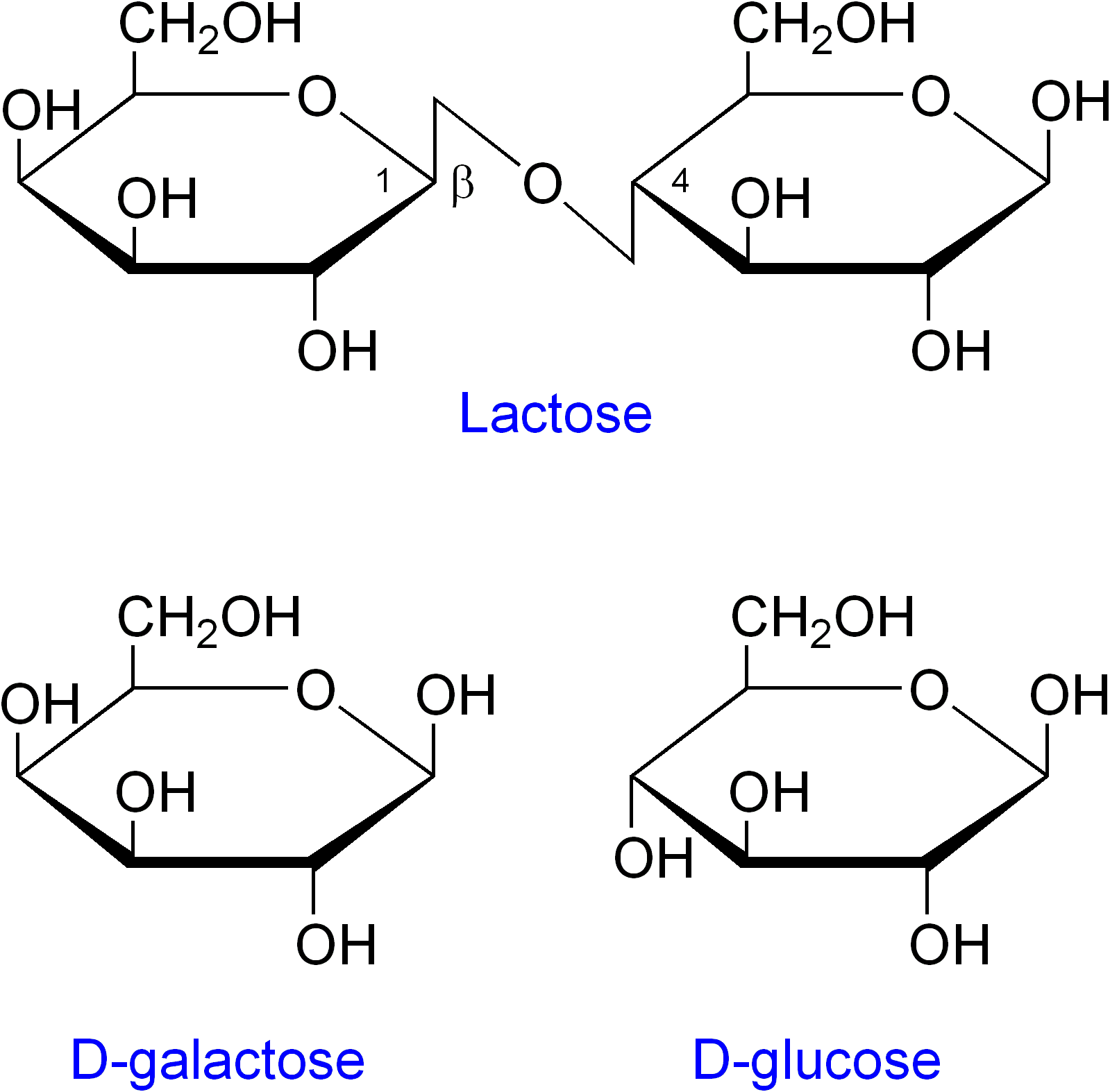 Lactose, D-galactose, D-glucose I made it myself.